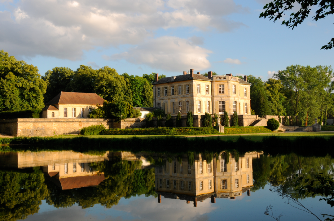 Le château de Villette après la rénovation.